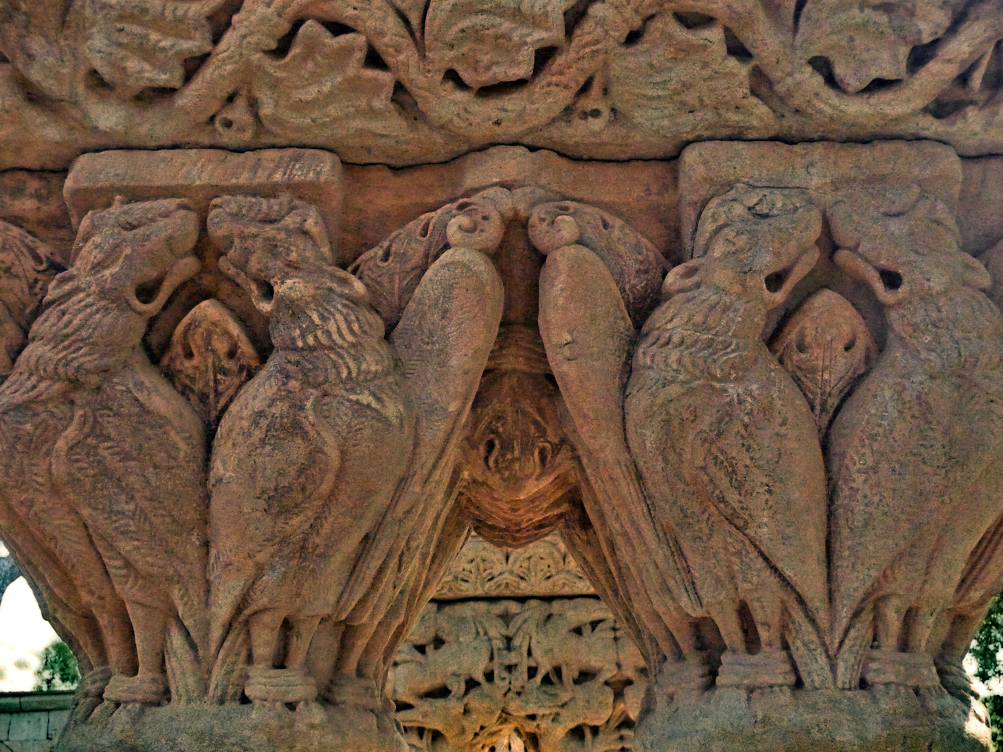 Claustre romànic del Mas del Vent de Palamós